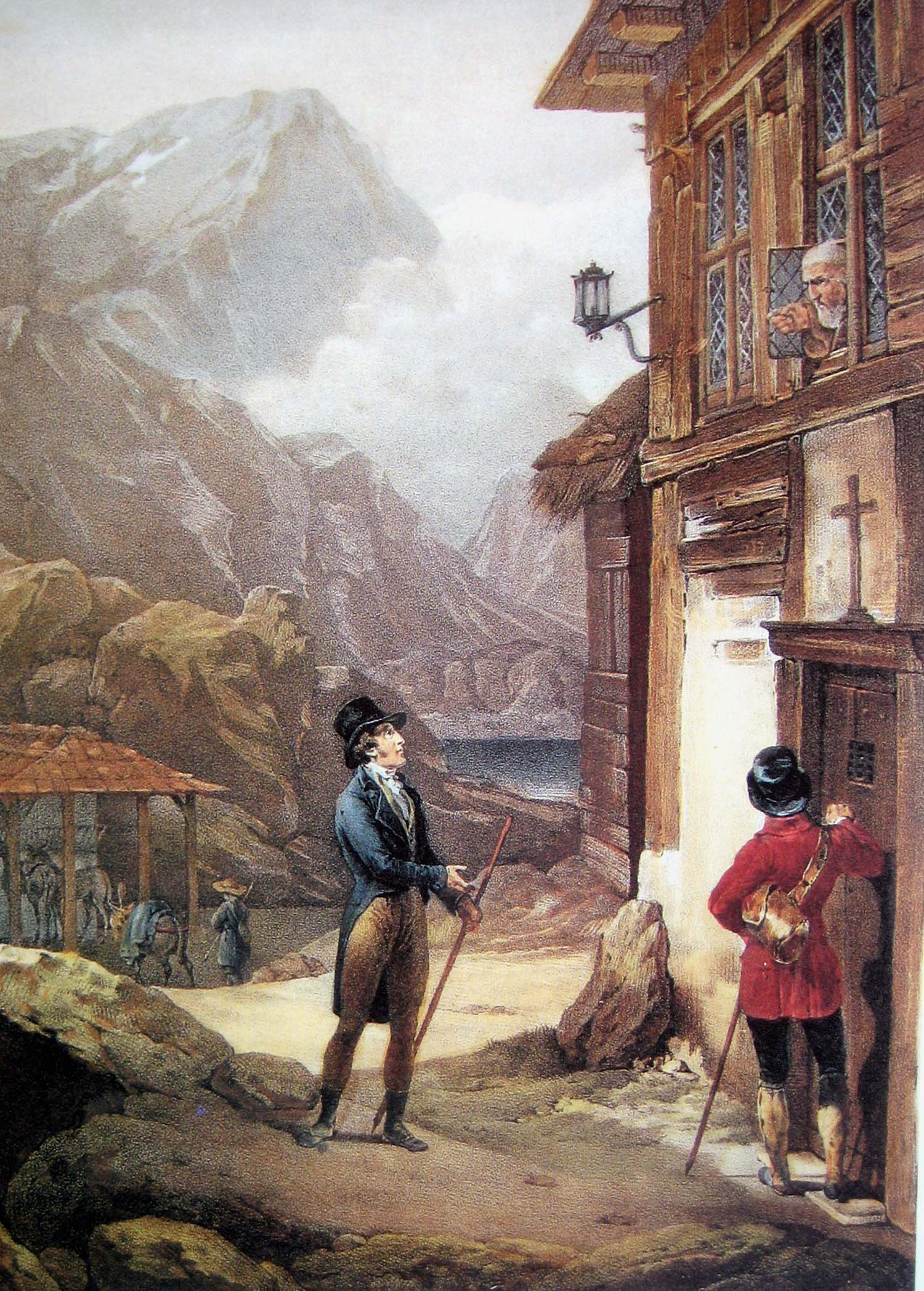 1793, Der Herzog von Chartres, der spätere König Louis-Philipp von Frankreich, begehrt Einlass ins Gotthard-Hospiz kol. Litho von Horace Vernet nach Zeichnung von Palheri, um 1830